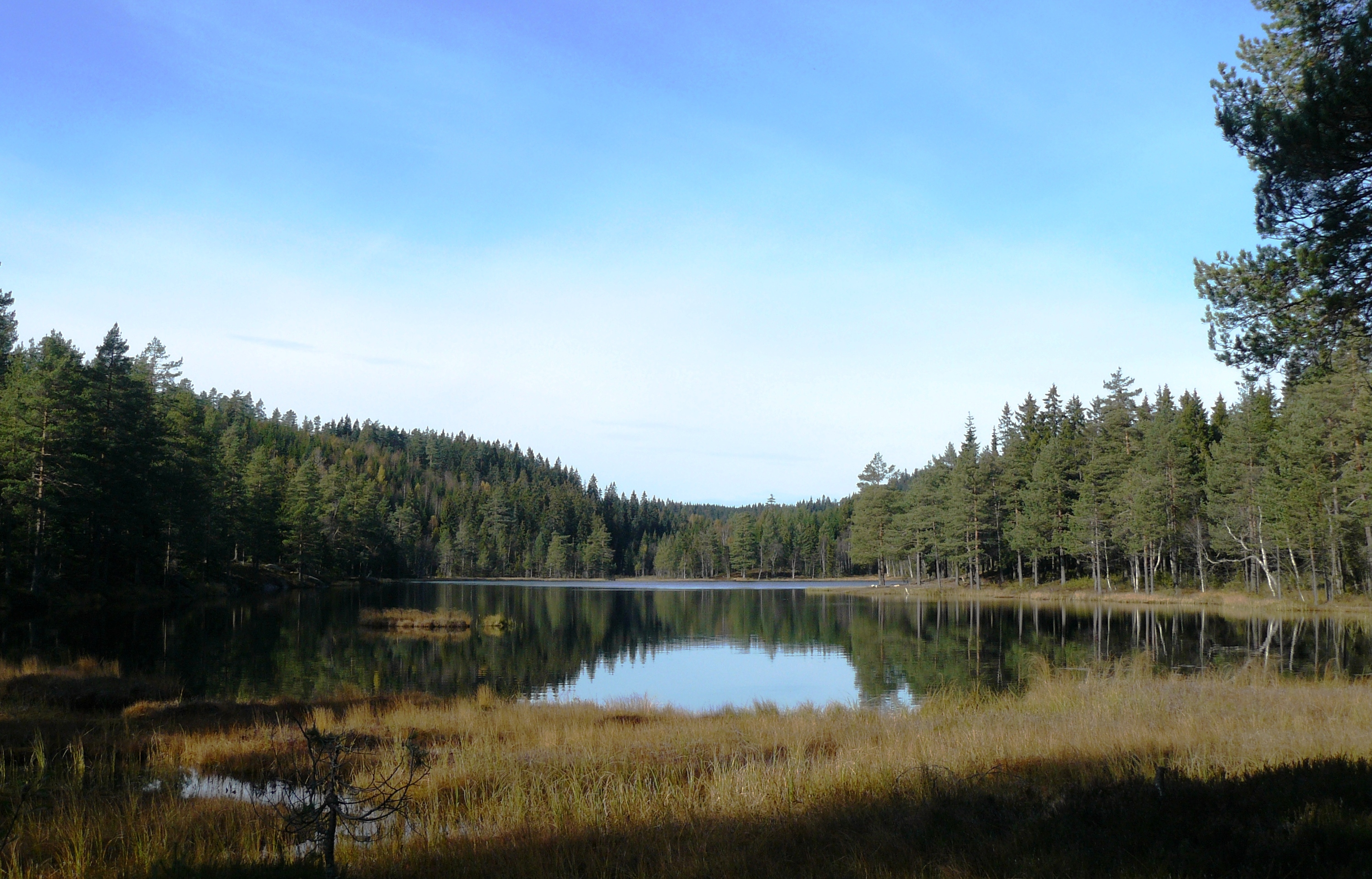 Kjulstjernet, Lillomarka, Oslo